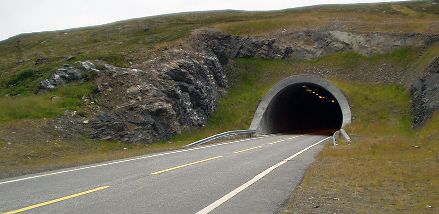 Nordsiden av Sarnestunnelen